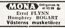 Biografannons för Mona, Götgatan 11-13